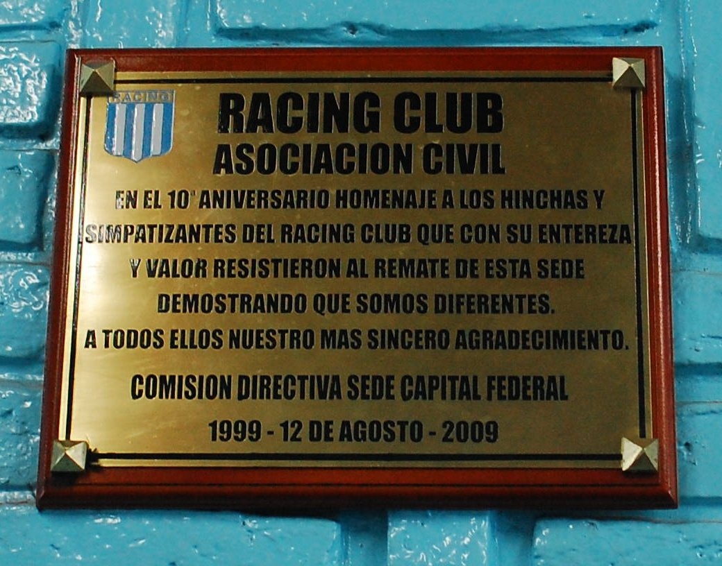 Placa conmemorativa de la defensa de la Sede Nogoyá, Racing Club